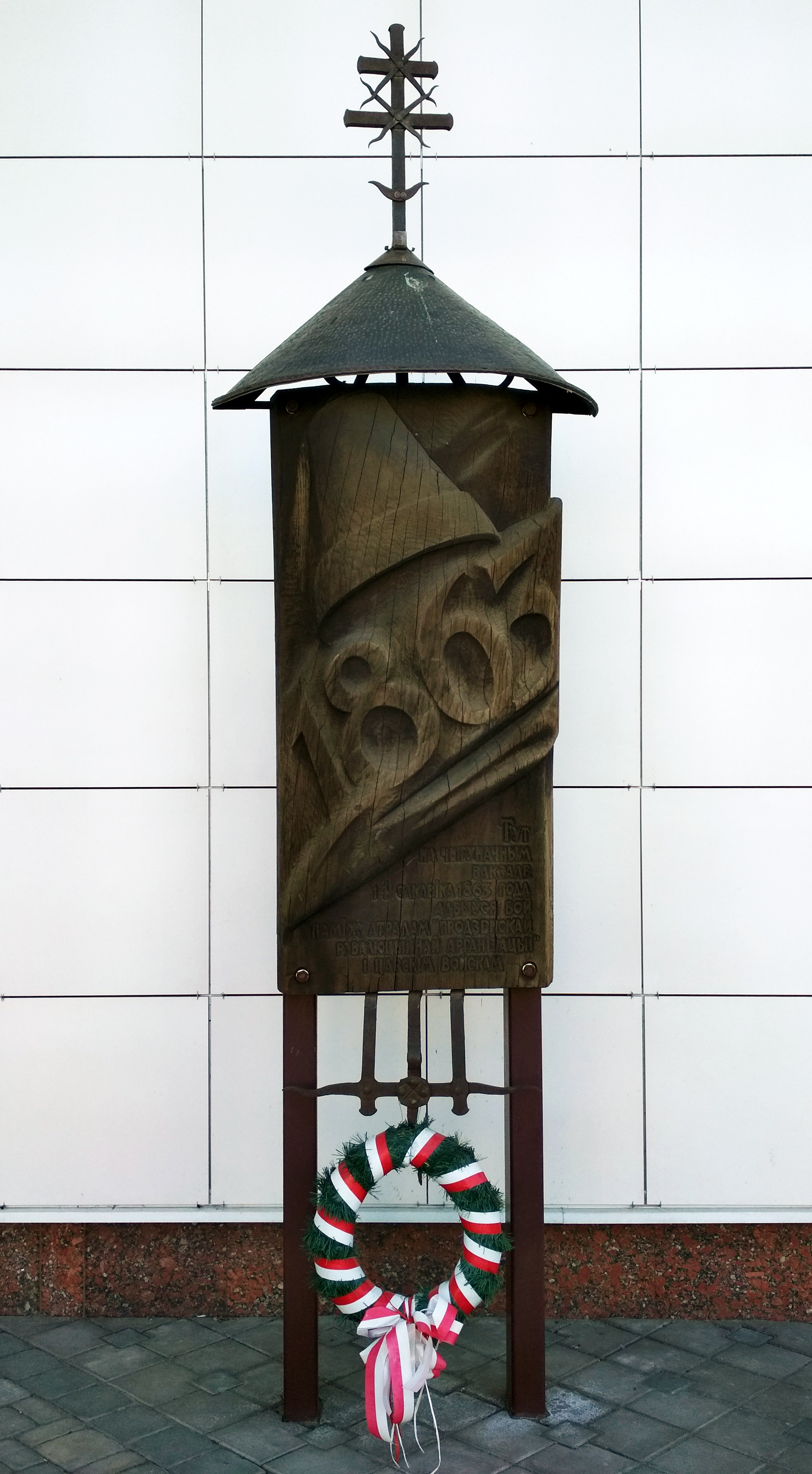 Гродна (2018). Чыгуначны вакзал. Помнік паўстанцам 1863 года. "Тут на чыгуначным вакзале 14 сакавіка 1863 года адбыўся бой паміж атрадамі "Гродзенскай рэвалюцыйнай арганізацыі" і царскім войскам."